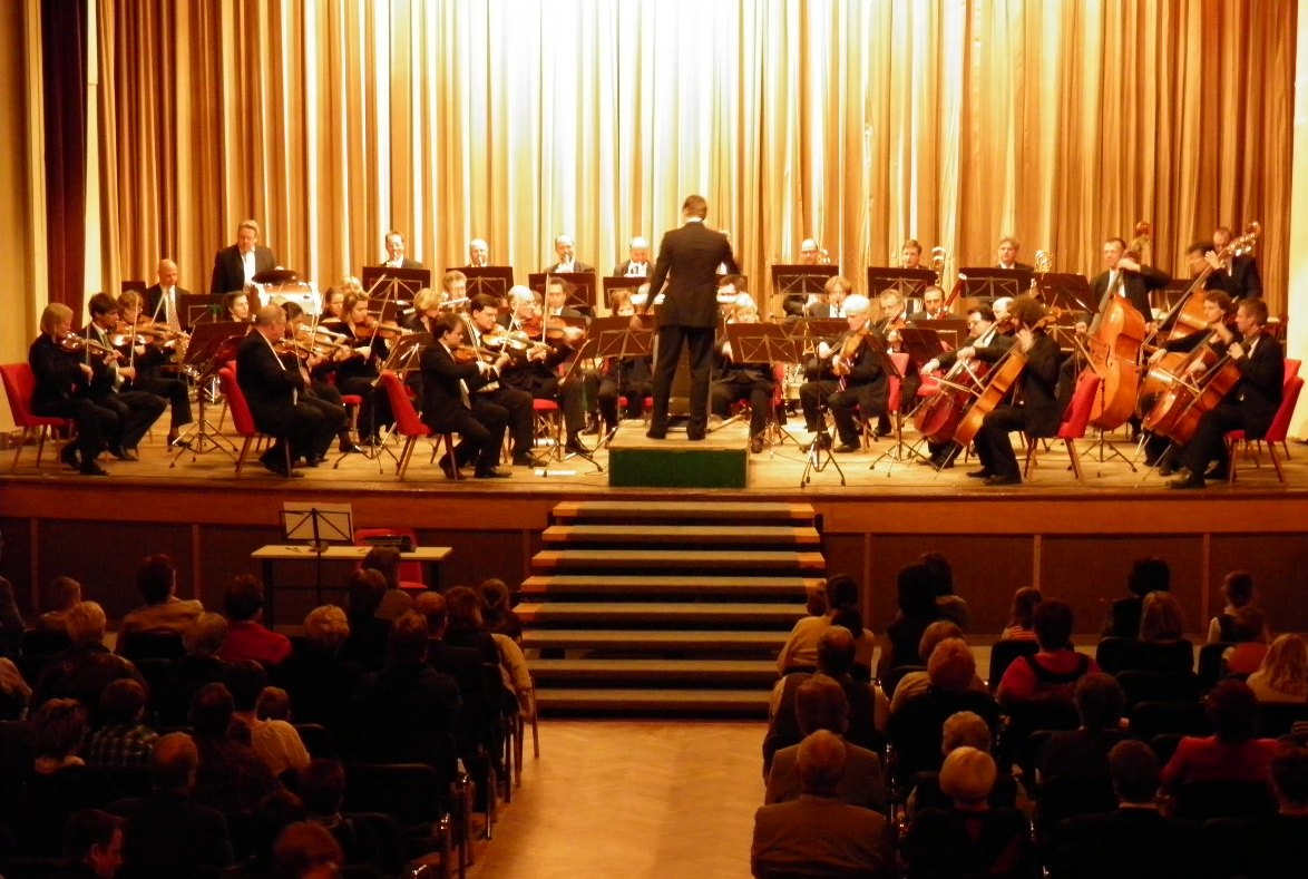 Kulturhaus Plessa, Platz des Friedens 1, 04928 Plessa.